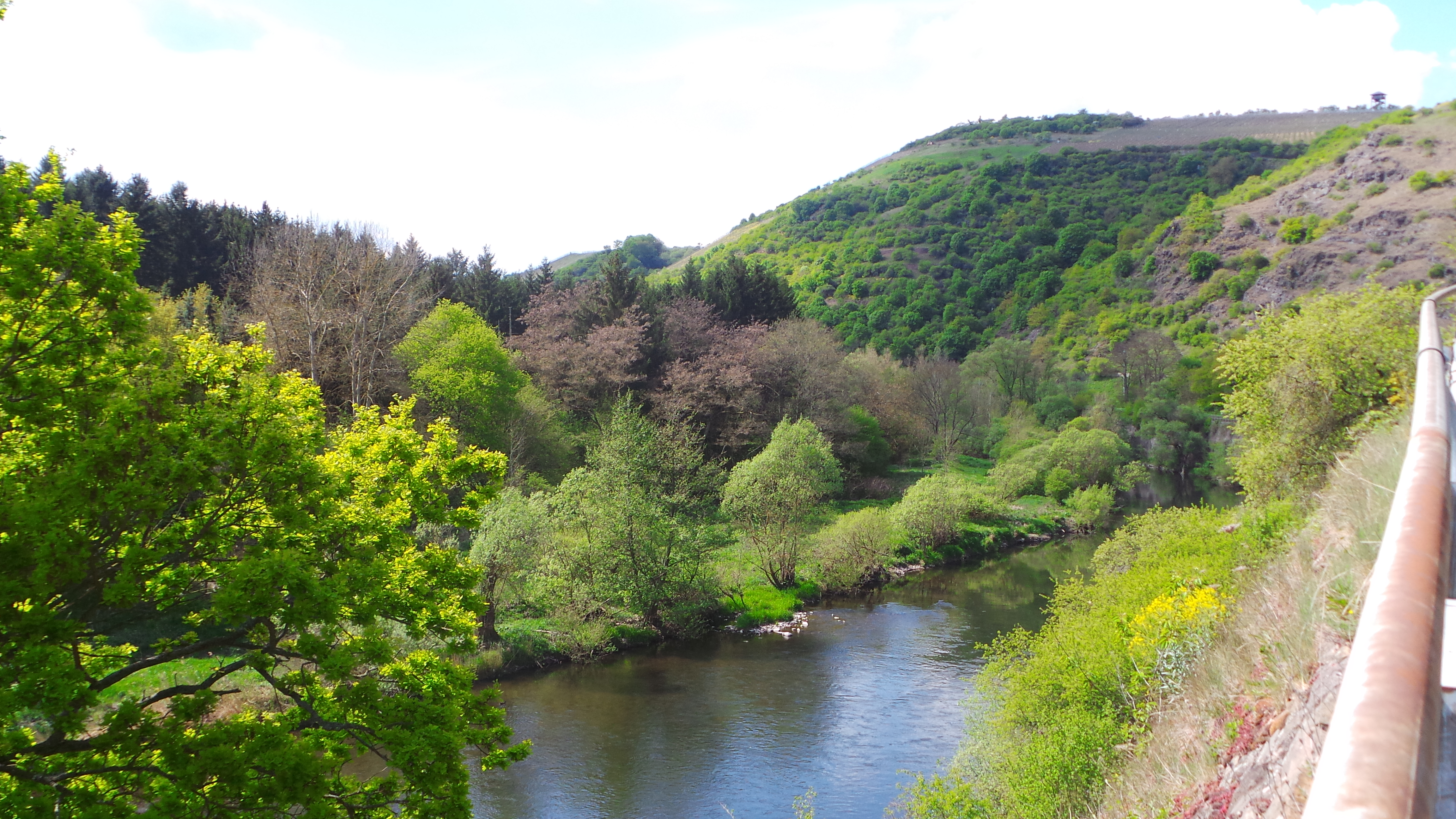 Die Nahe im Naturschutzgebiet „Nahetal von Boos bis Niederhausen“ im Landkreis Bad Kreuznach, hier unterhalb Schloßböckelheim